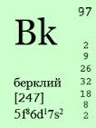 Берклий